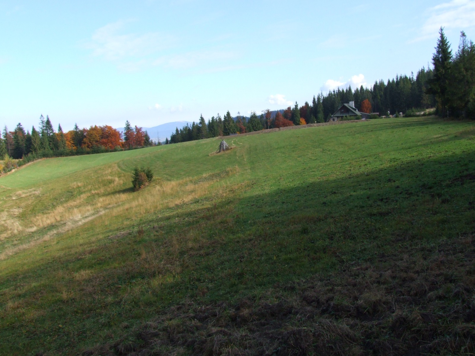 Polana Stare Wierchy w Gorcach